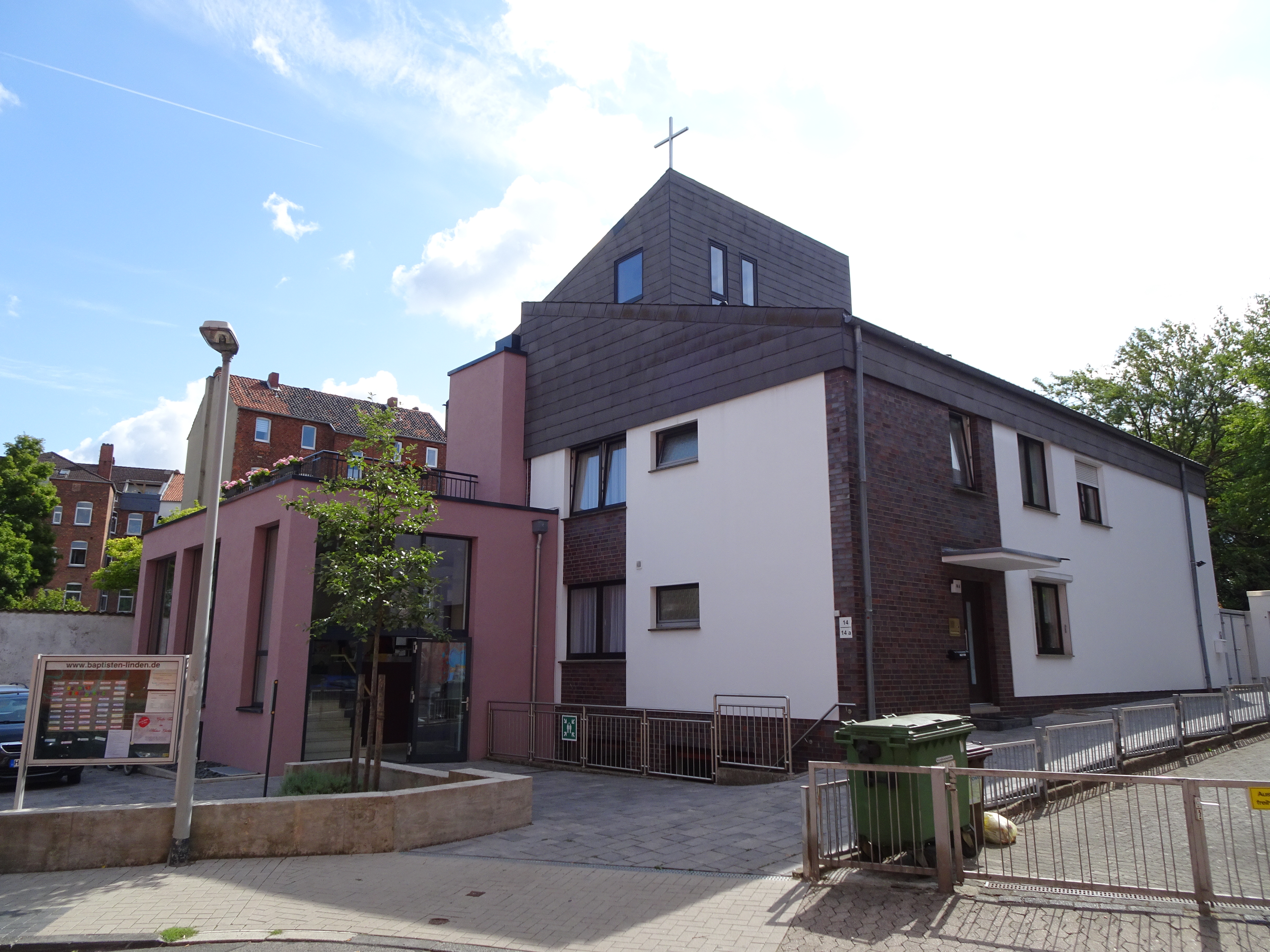 Gebäude der Evangelisch-Freikirchlichen Gemeinde Hannover-Linden in der Hohen Straße 14 in Hannover